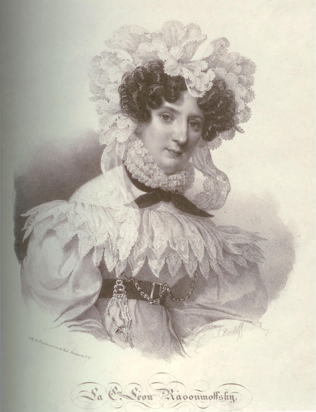 Мария Григорьевна Разумовская (1772-1865), ур. Вяземская, в 1 браке за А.Н.Голицыным.